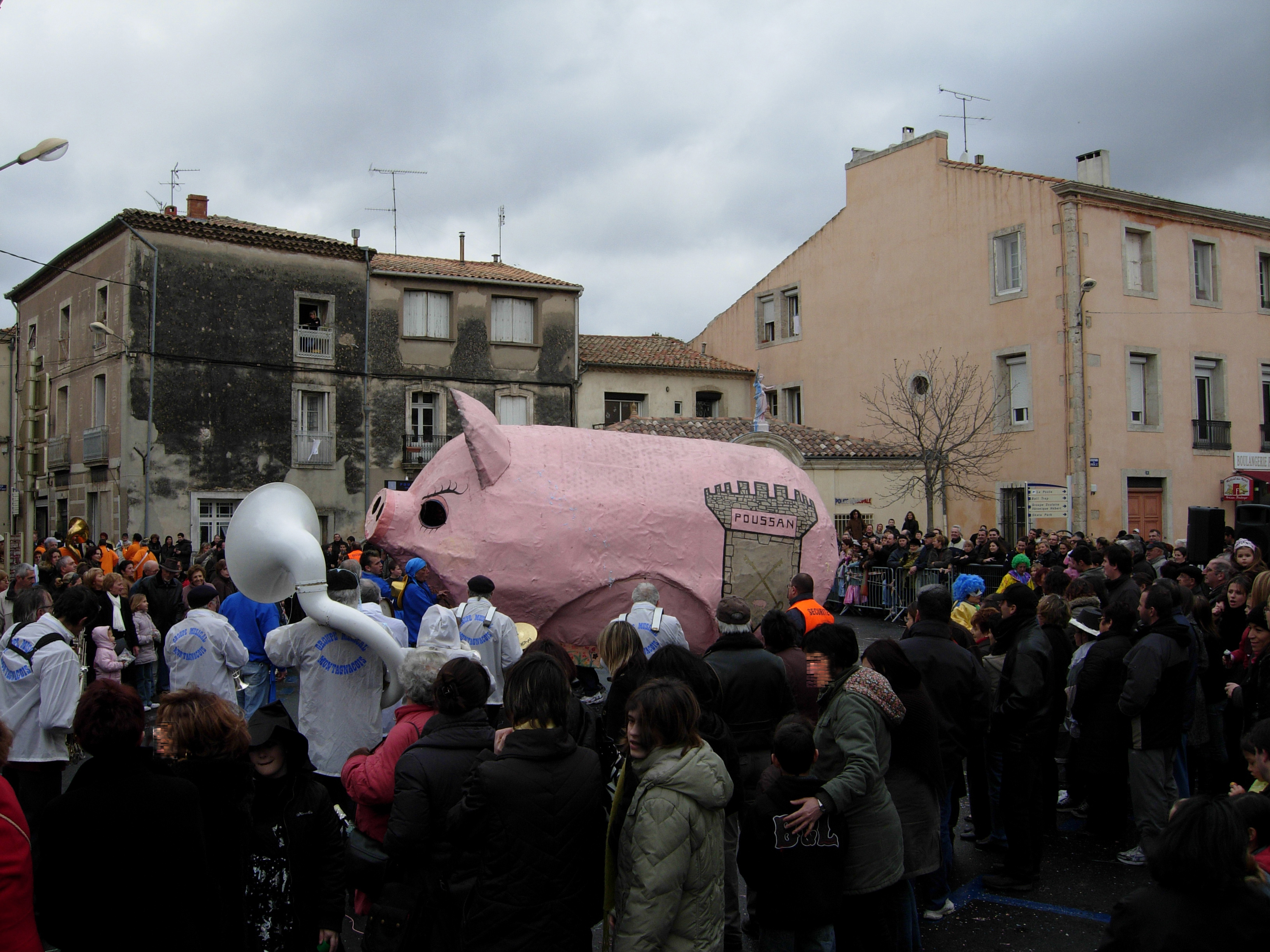 Poussan (Hérault, Languedoc-Roussillon, France) - Le Cochon de Poussan (animal totémique du village).